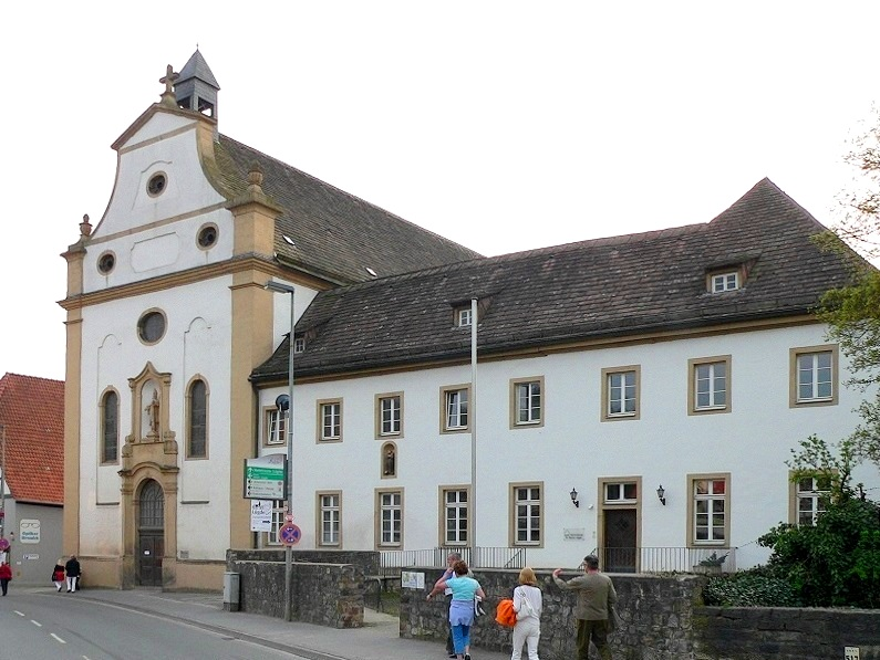 Lügde, ehemaliges Franziskanerkloster